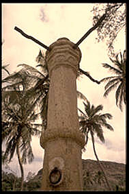 Pelourinho. Cidade Velha.